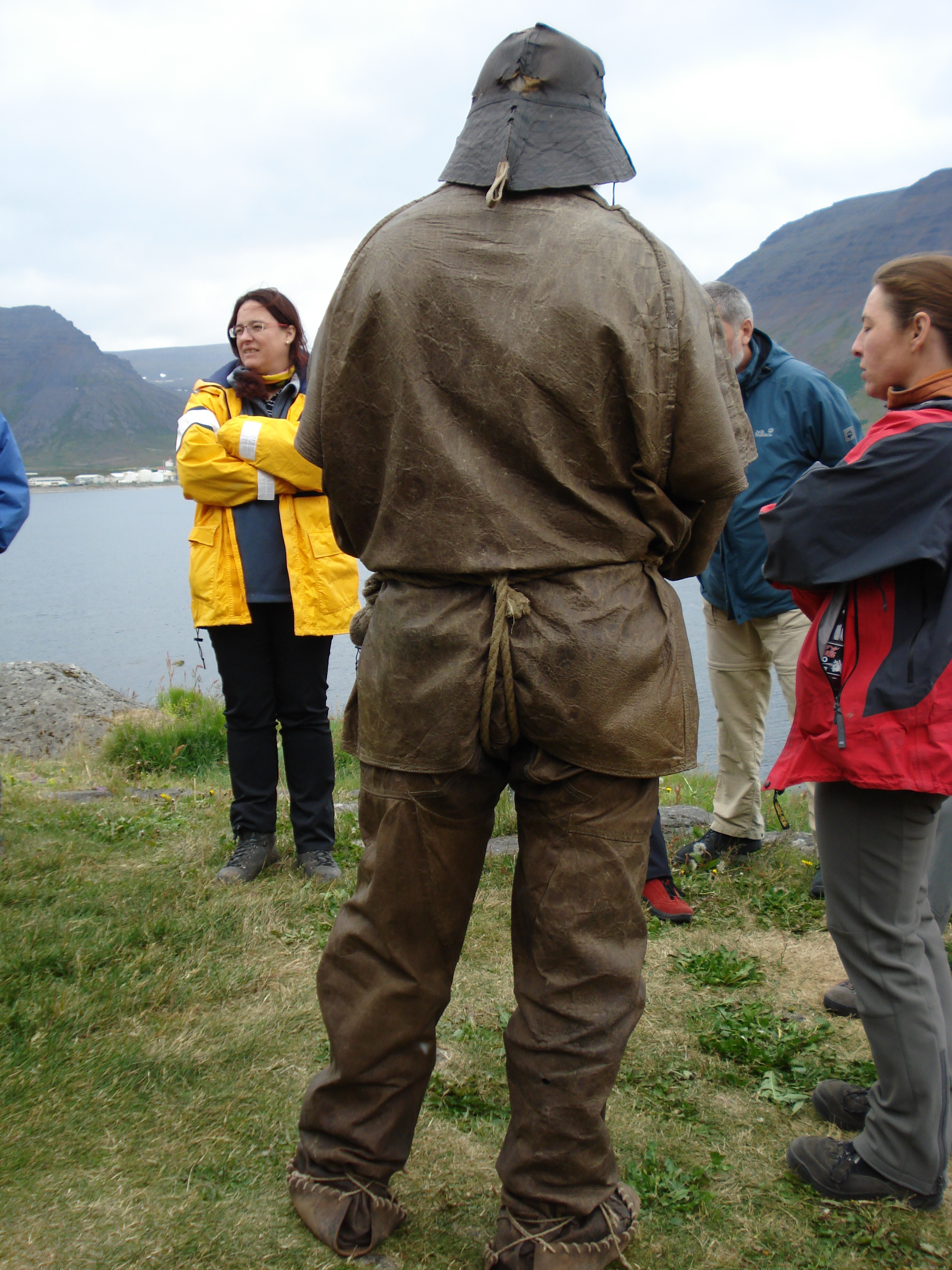 Traditional Fisherman, Bolungavík, Iceland